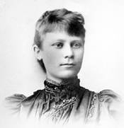 Adelaide R. Hasse